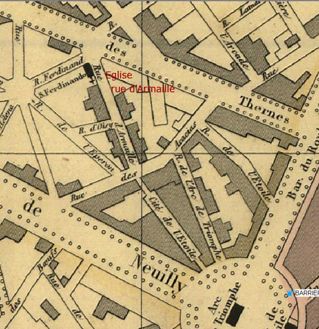 rue d'Armaillé extrait du plan Doyonnet de 1849 entre Arc de Triomphe et Avenue des Ternes titre : Paris en proportion avec son enceinte au 1/14 000 env.imprimé par Chardon Jne et Fils dressé par CH DYONNET rue Saint Jacques 220.